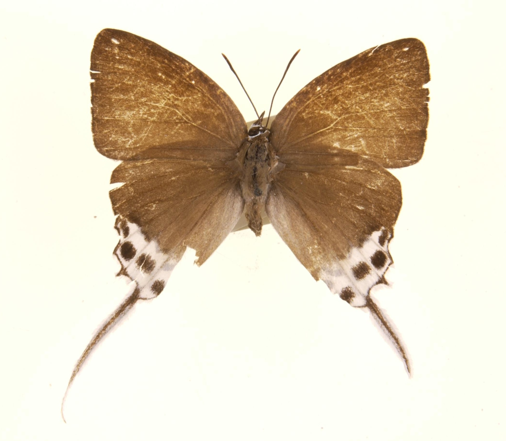 Jacoona anasuja (C. & R. Felder, [1865]) Malaya